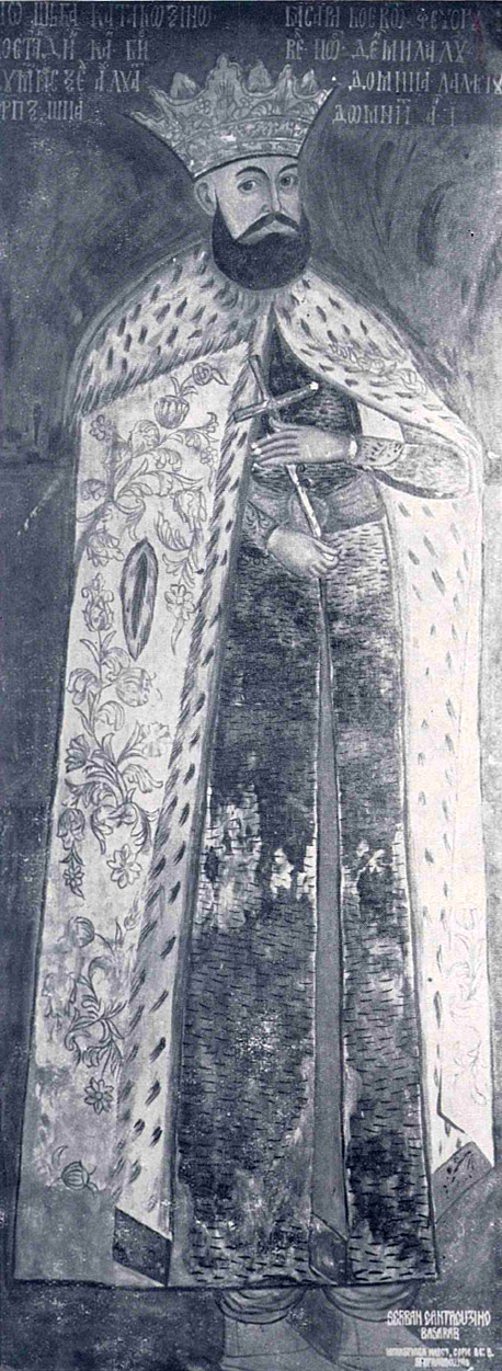 Şerban Cantacuzino at Hurezi monastery